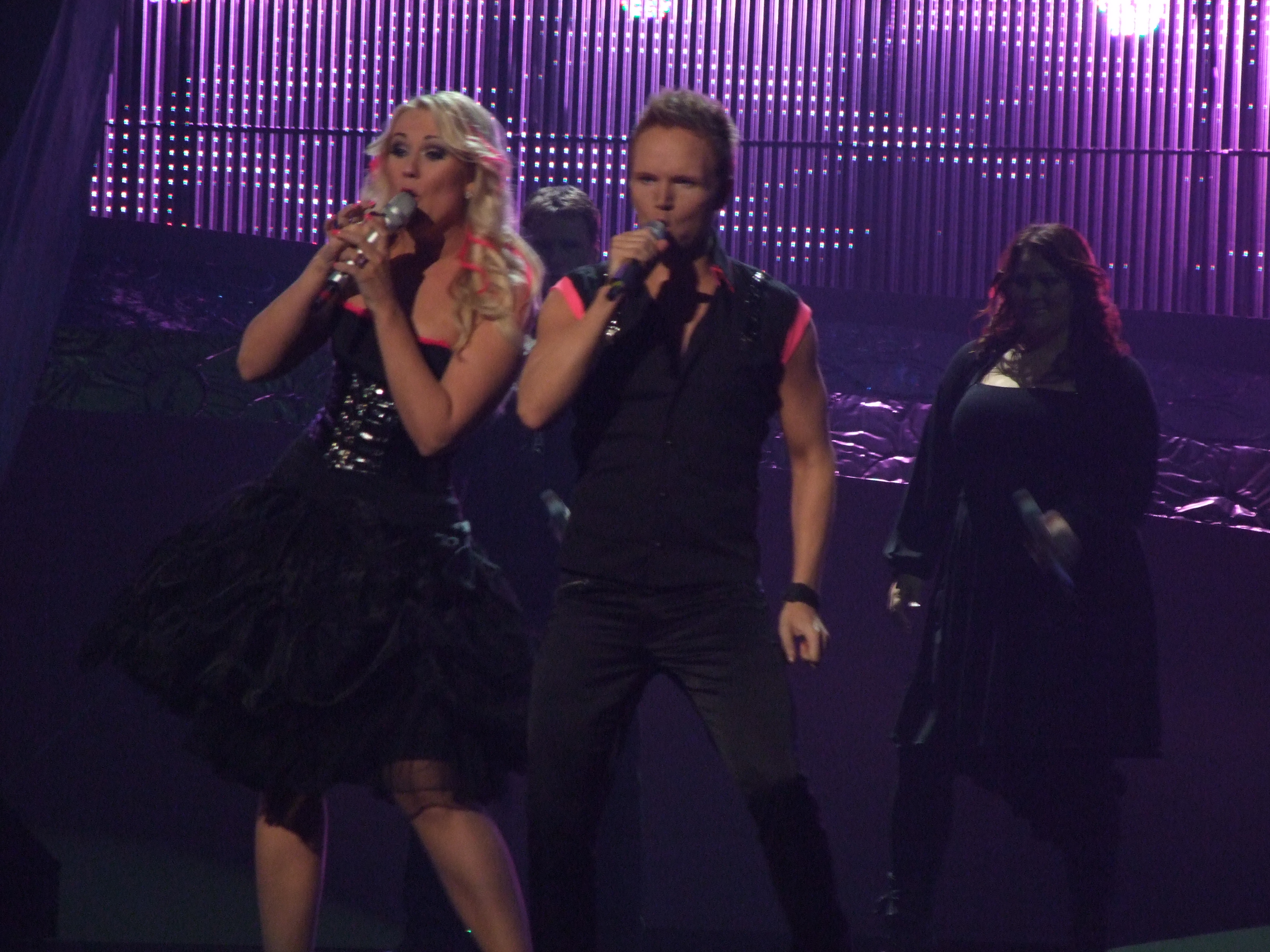 Final Eurovision 2008